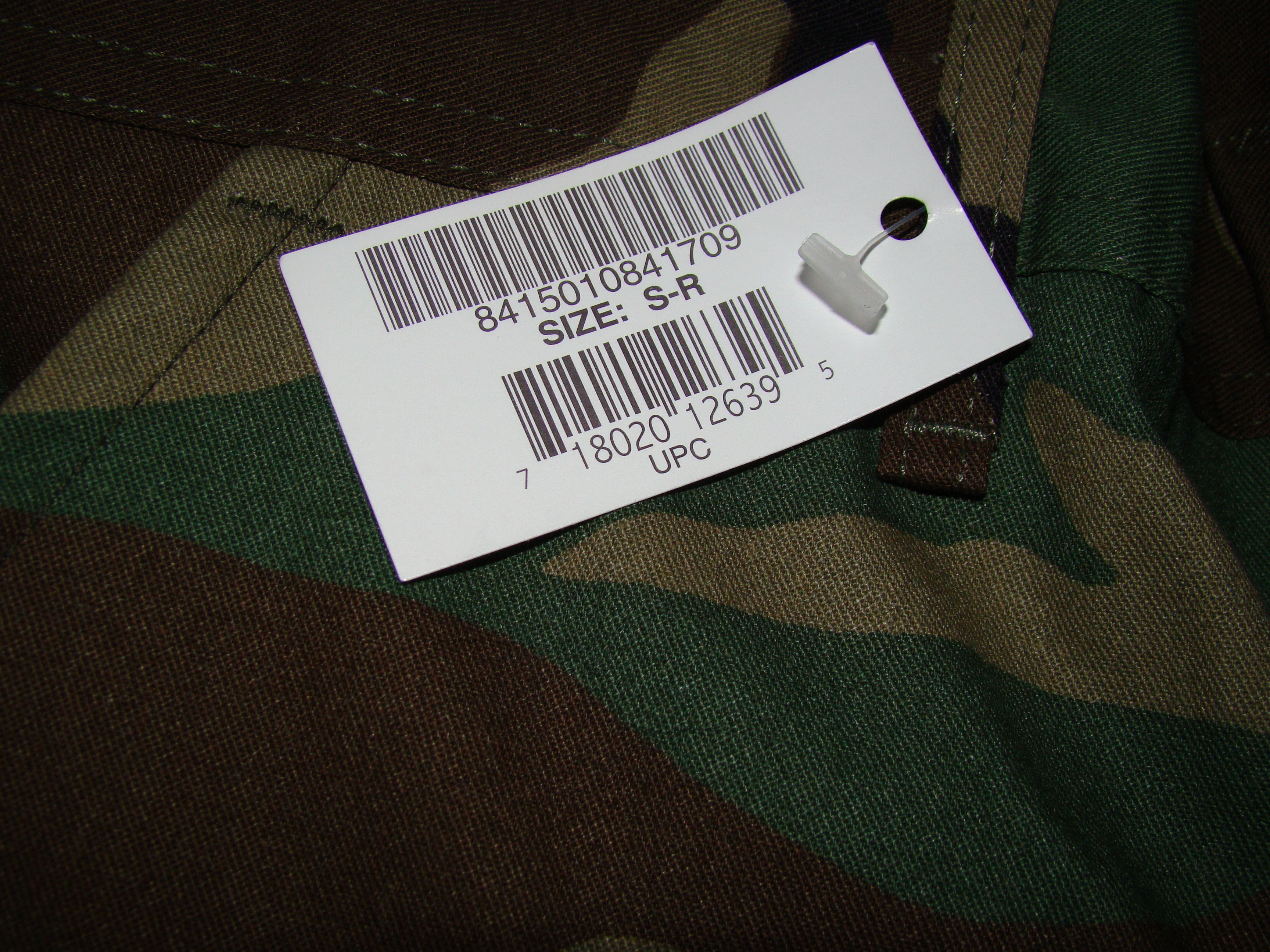 Papierowa metka z numerem NSN przy spodniach BDU (woodland)